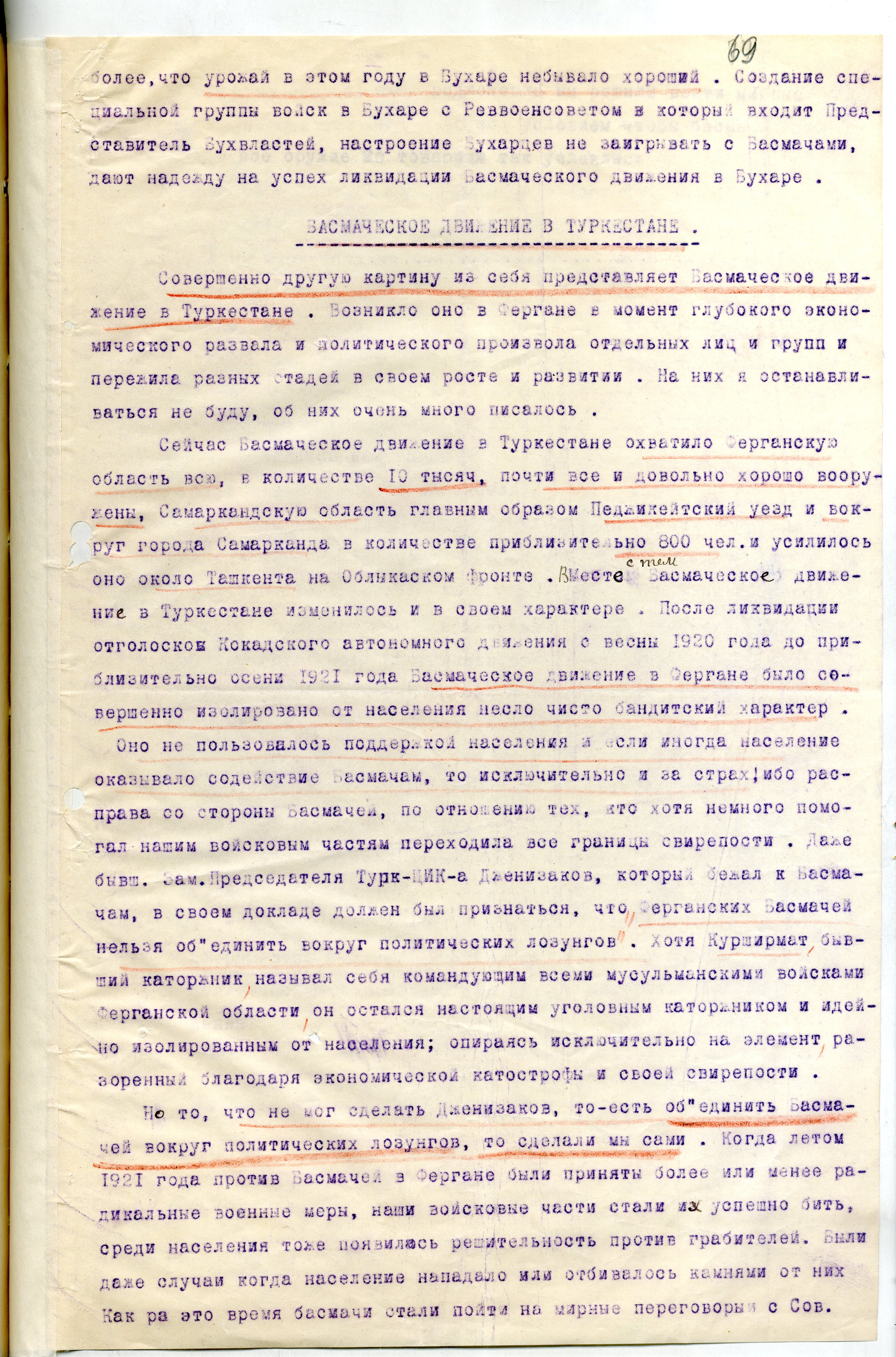 “The Basmachi Movement in Central Asia and the Struggle Against It.” Memorandum from Yakov Peters. RGASPI,f.17,op.84,d.356,l.67-74